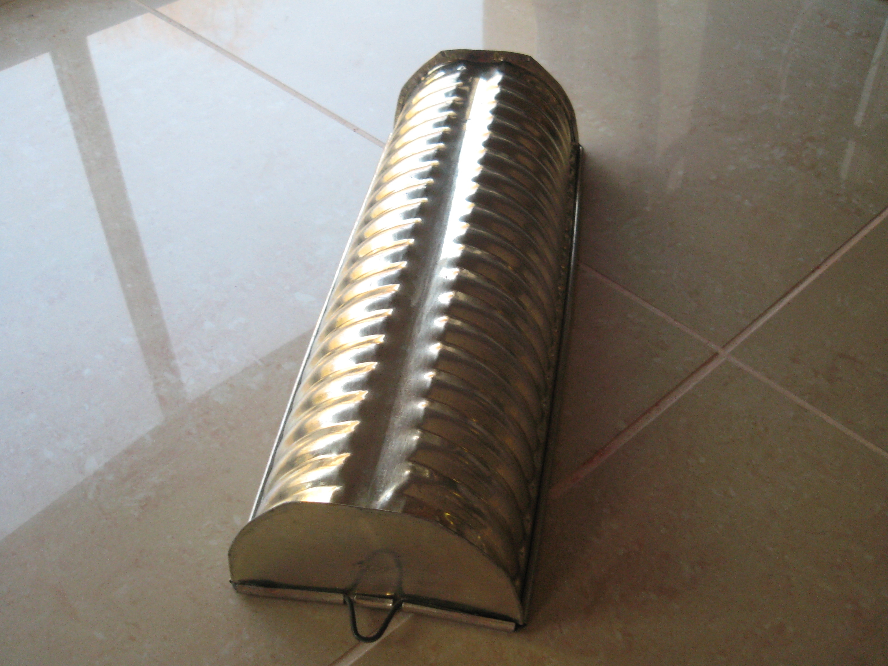 Rehrückenform, eine in Österreich gebräuchliche Backform aus Weißbleich